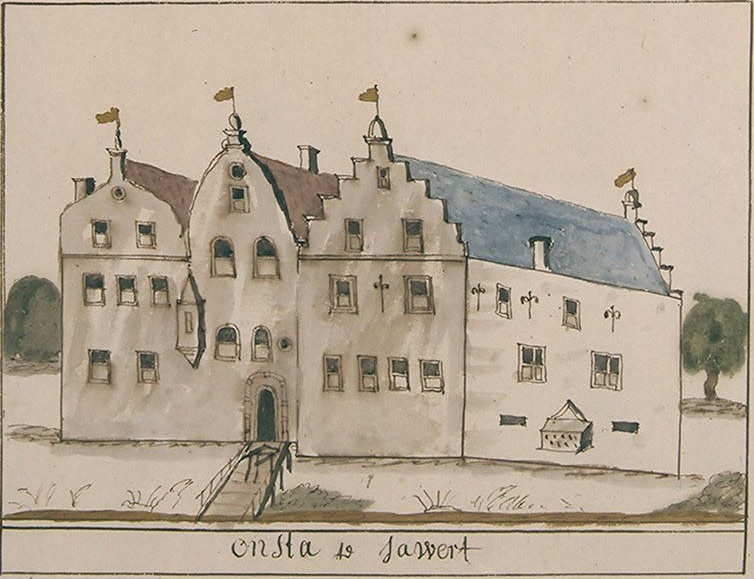 De borg Onsta te Sauwerd.